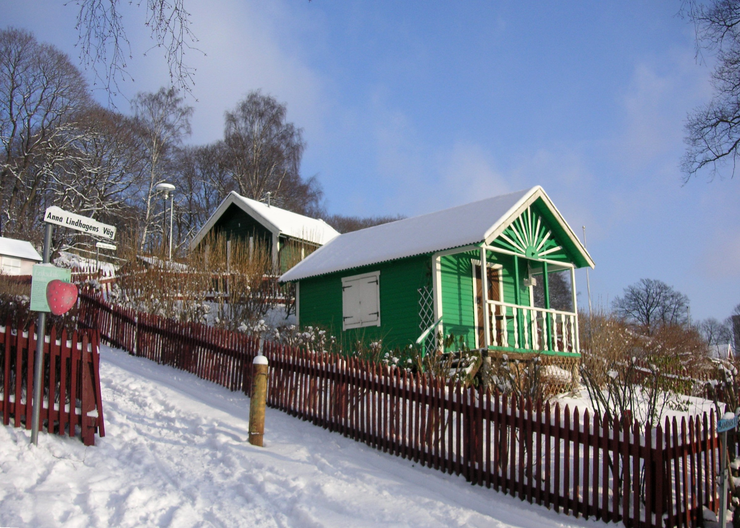 Eriksdalslunden på Södermalm, Stockholm